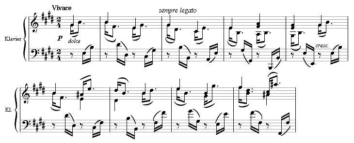 Takt 1-8 aus Beethovens Klaviersonate op. 109, erster Satz